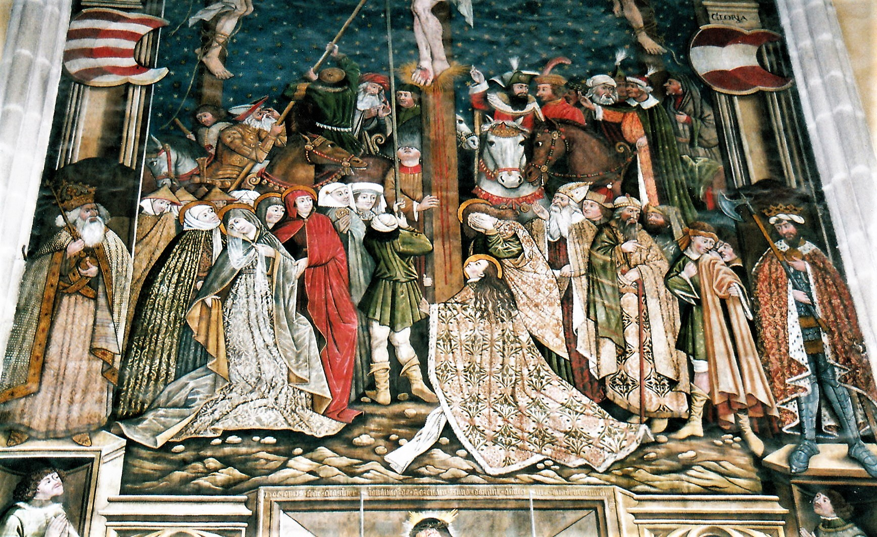 Evangelische Stadtpfarrkirche: Wandfresko im Chorraum (Detail)